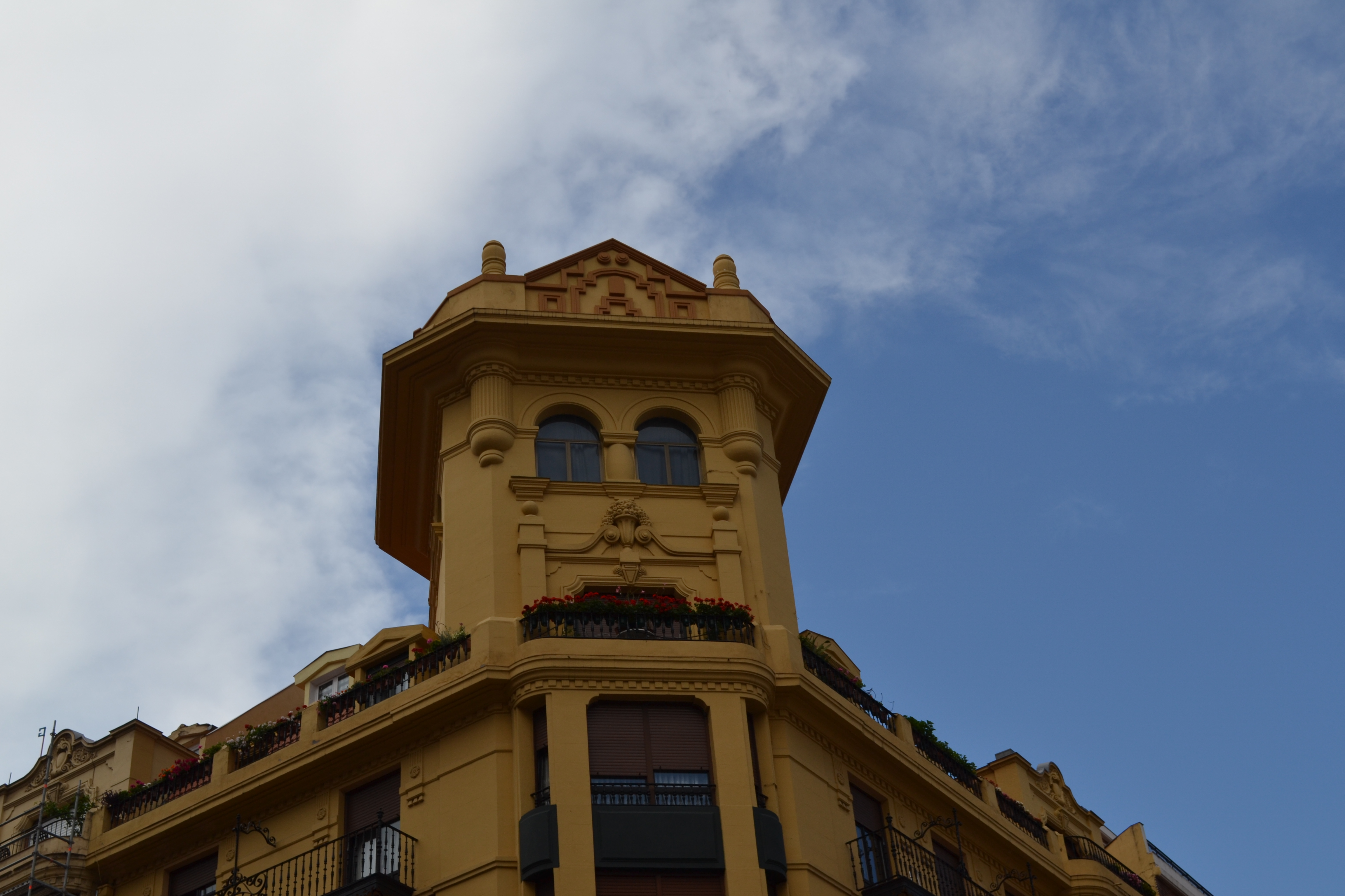 Ático con forma de cara. :-)